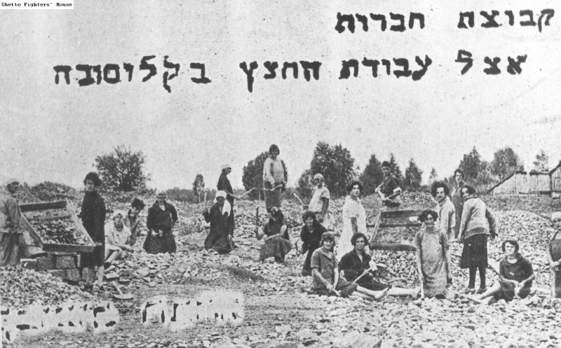 חברות תנועת החלוץ מקיבוץ ההכשרה בקלוסובה בעבודה במחצבה